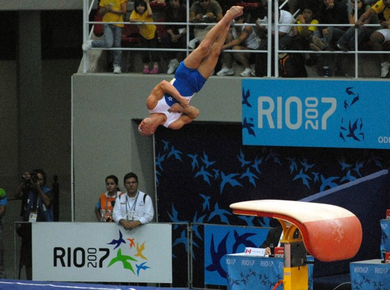 Rio de Janeiro - O atleta da ginástica artística Diego Hypólito na prova de salto masculino do Pan 2007